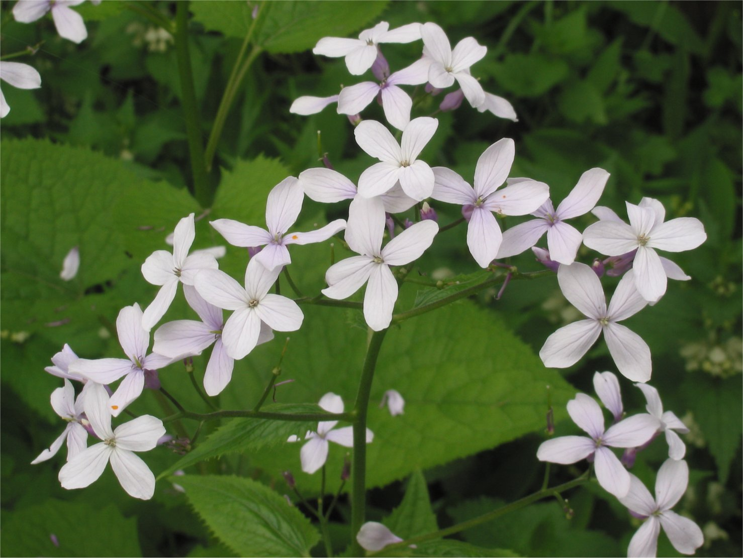 (nl: Vaste Judaspenning bloeiwijze) Lunaria rediviva